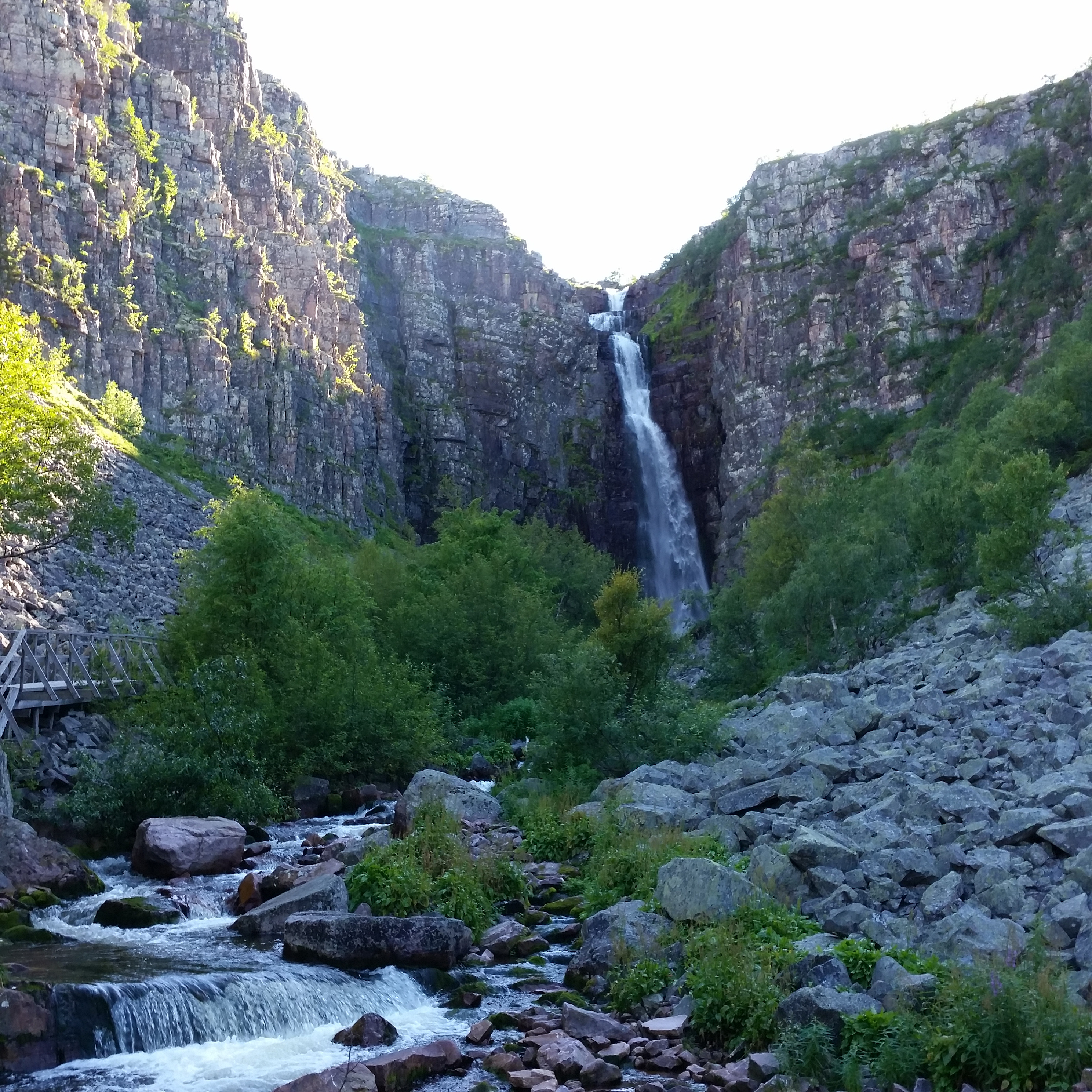 Njupeskär, der größte Wasserfall in Schweden. Dalarna / SE